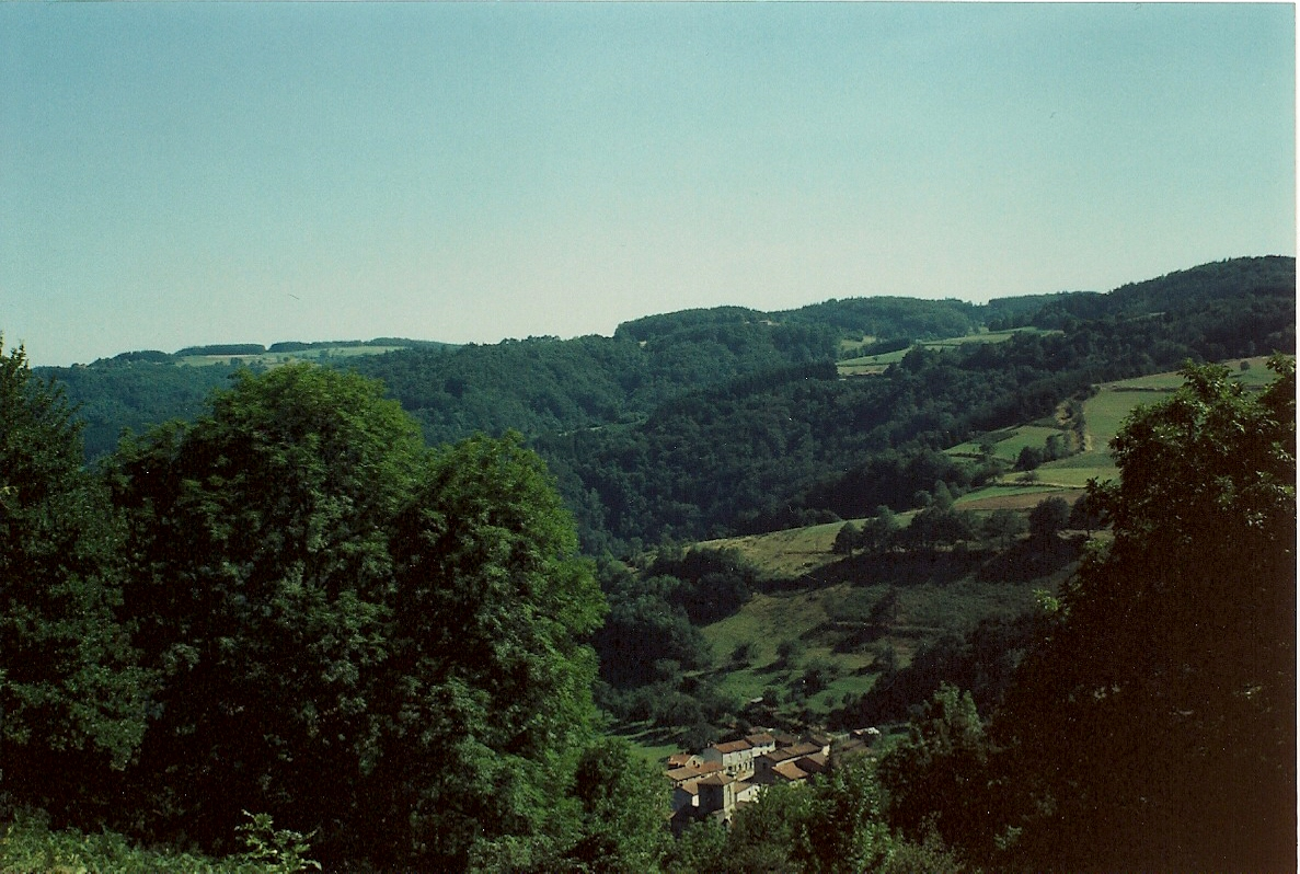 Photo de la ville de Saint-Gervais-sous-Meymont.